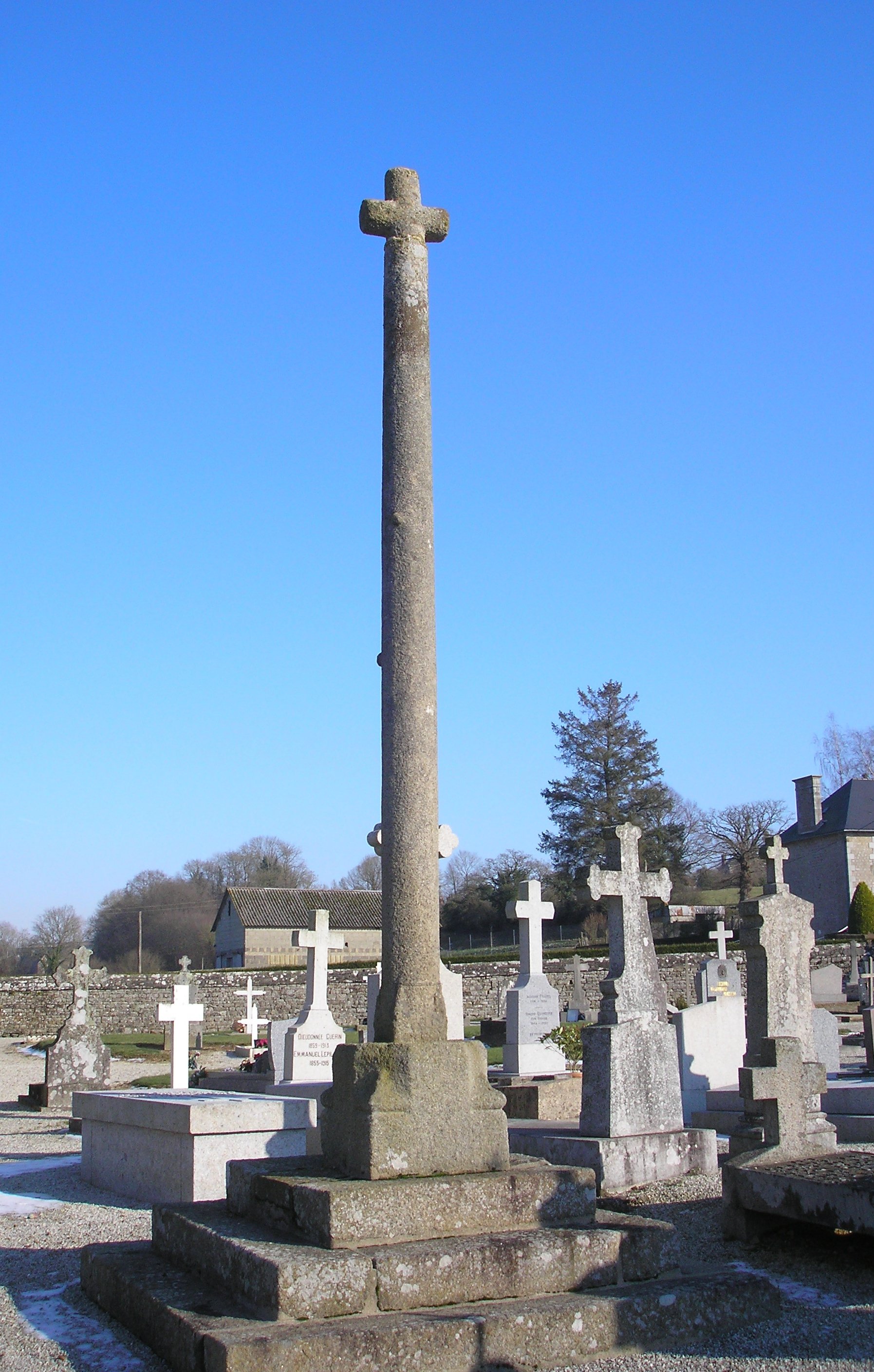 Sainte-Marie-Outre-l'Eau (Normandie, France). La croix du cimetière.